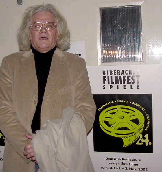 Fritz Lehner im Jahre 2002 auf dem Filmfest in Biberach an der Riß (Eigenes Foto, GNU FDL). Bild zur Verfügung gestellt von Weberberg.de, der Website für Biberach.